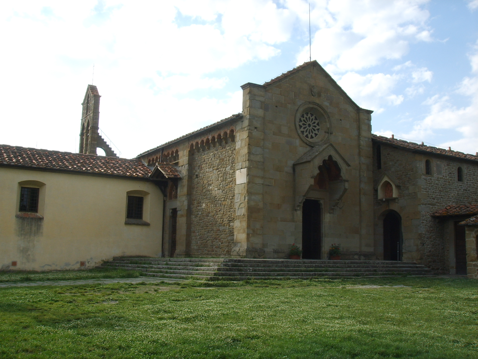 Fiesole, san francesco